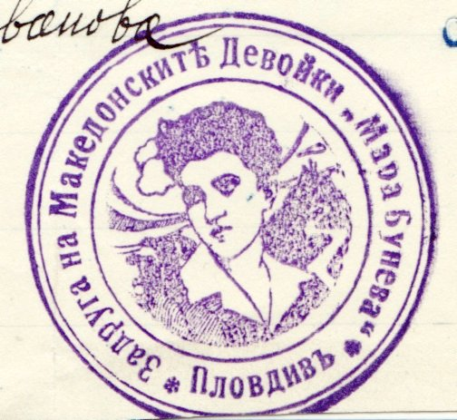 Печат на Пловдивското македонско женско дружество "Мара Бунева".